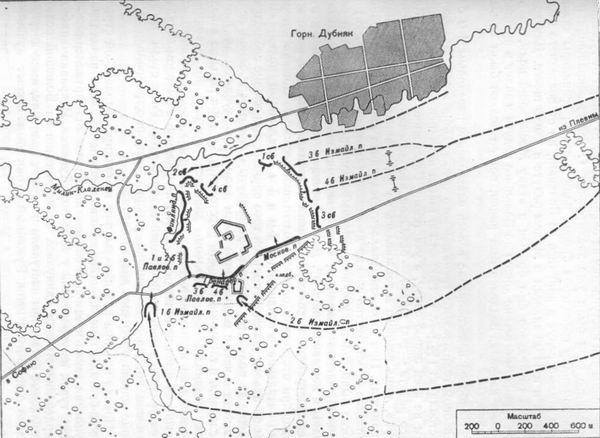 карта на атаката на Горни Дъбник 12/24 октомври 1877г.